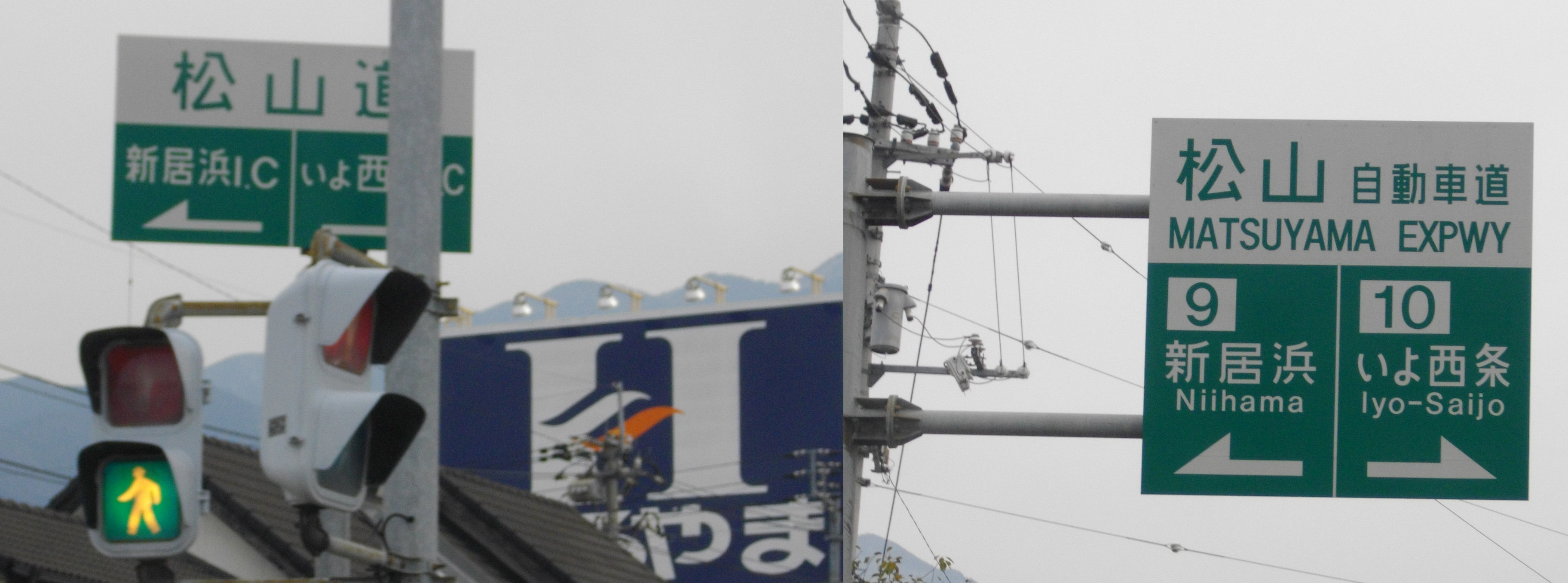 愛媛県新居浜市・東城交差点の北に存在する新居浜・いよ西条両ICの案内標識